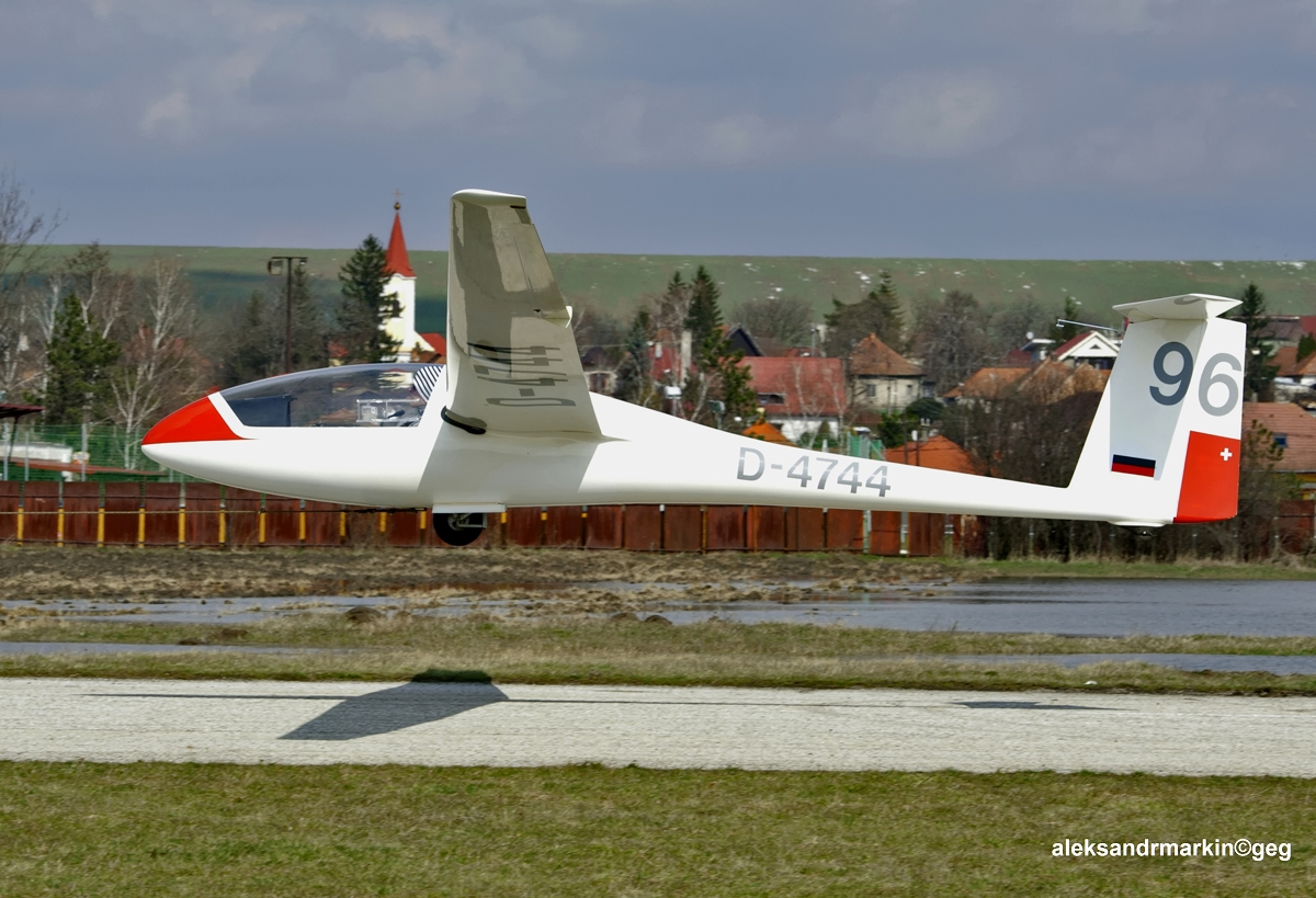 PribinaCup.Nitra 2013.Slovakia.